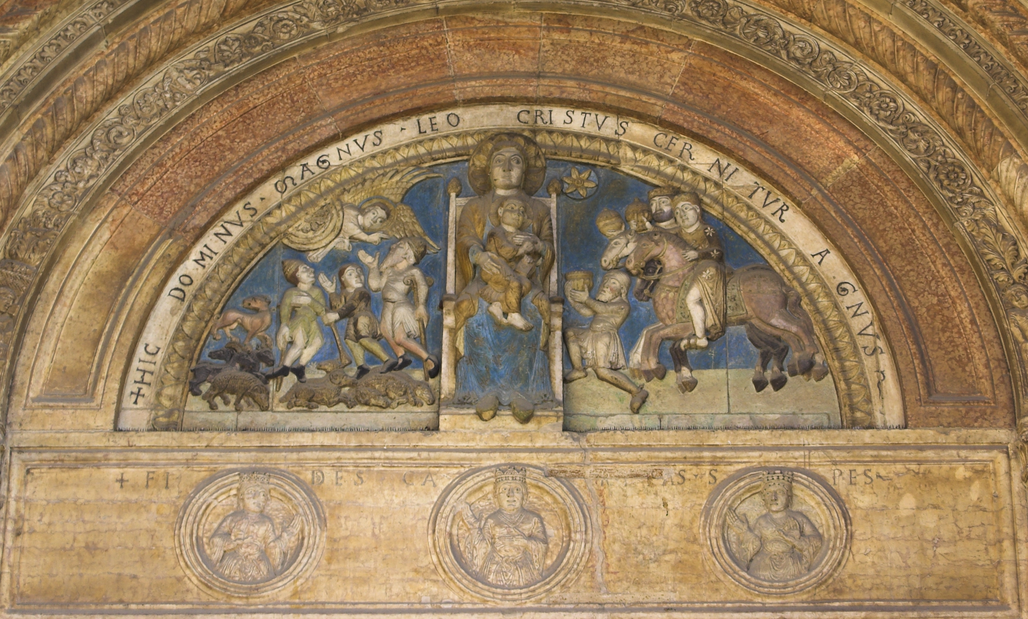 Lunetta del portale principale del Duomo di Verona, opera di Nicholaus